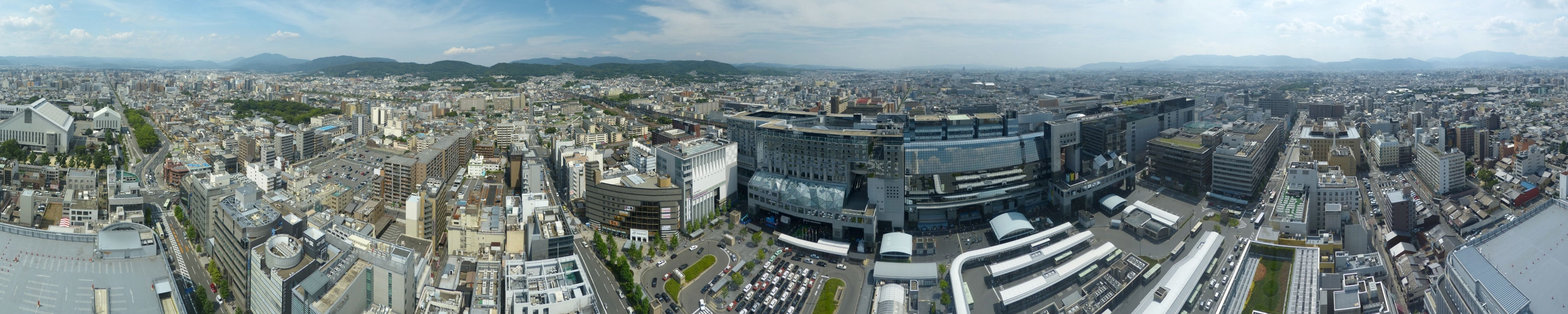 京都タワーから望む京都